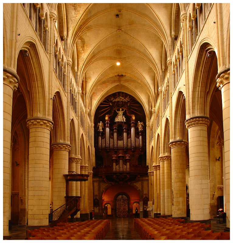 Onze-Lieve-Vrouwebasiliek, tongeren